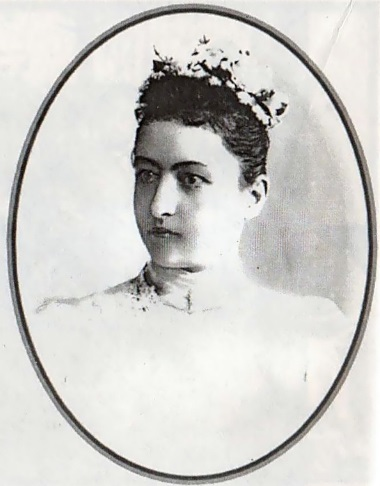 Анна Александровна Цаликова (1876 – 1914) в юности, фотография